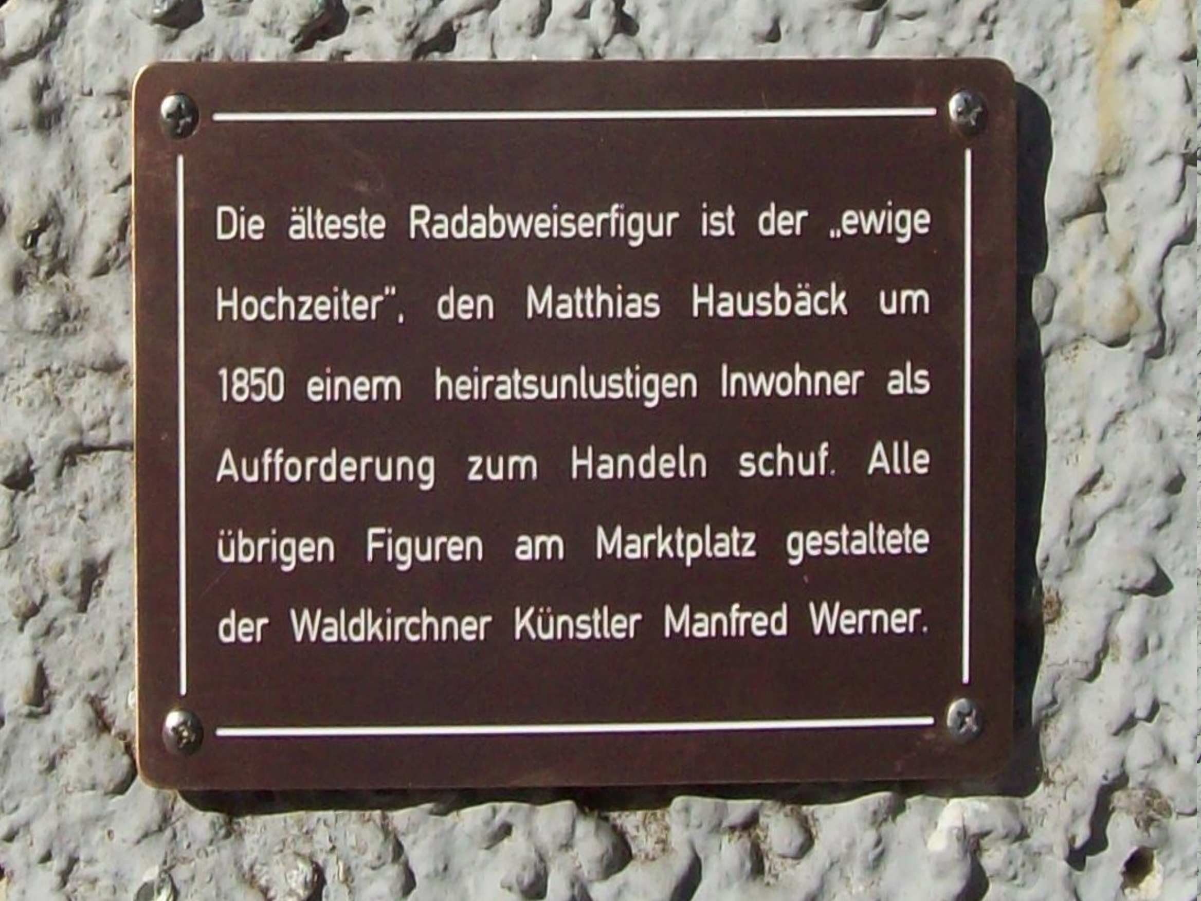 Waldkirchener Radabweiser - Der ewige Hochzeiter - Texttafel Die älteste Radabweiserfigur ist der „ewige Hochzeiter“, den Matthias Hausbäck um 1850 einem heiratsunlustigen Inwohner als Aufforderung zum Handeln schuf. Alle übrigen Figuren am Marktplatz gestaltete der Waldkirchner Künstler Manfred Werner.